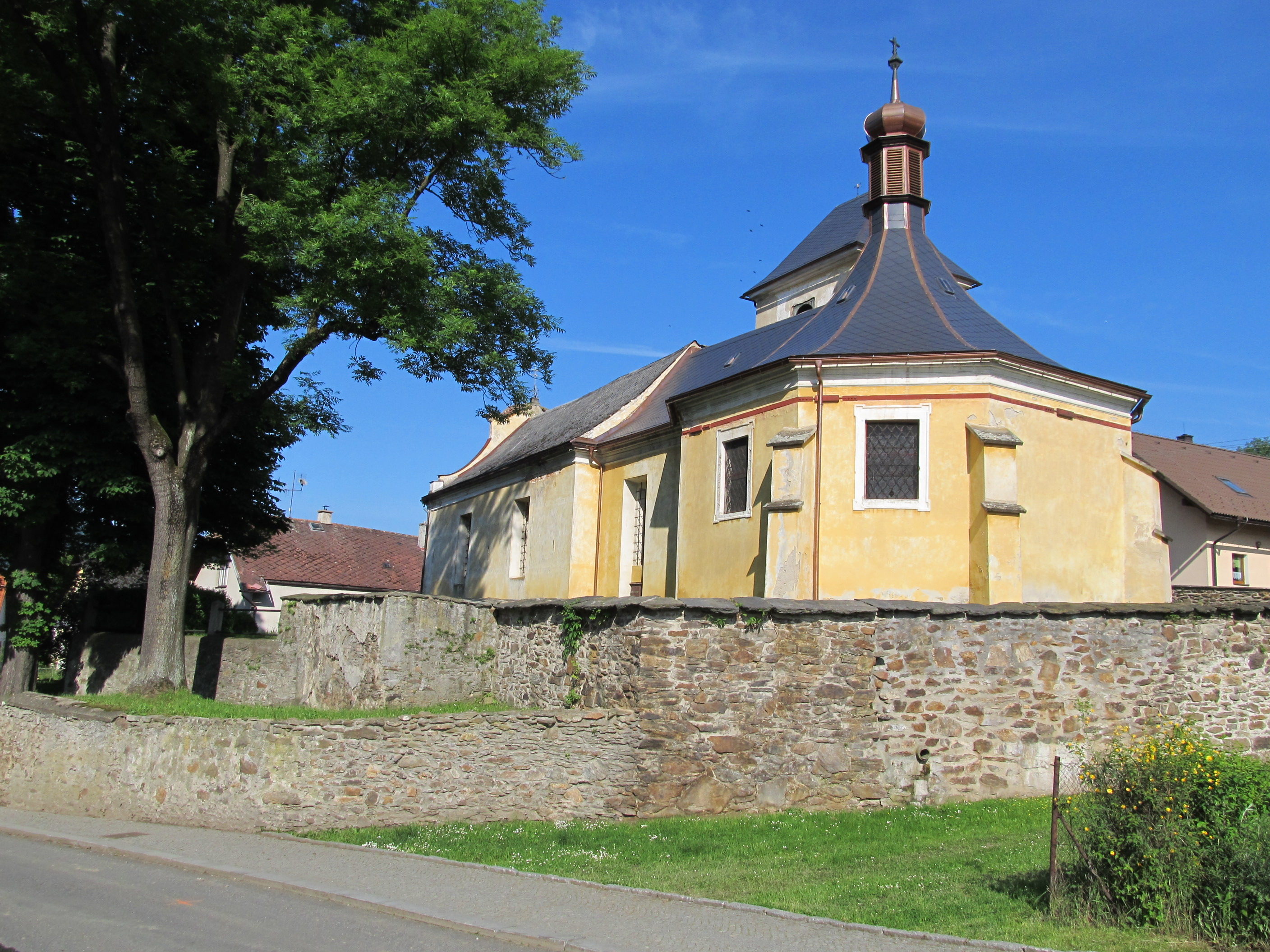 Dešenice - kostel sv. Mikuláše